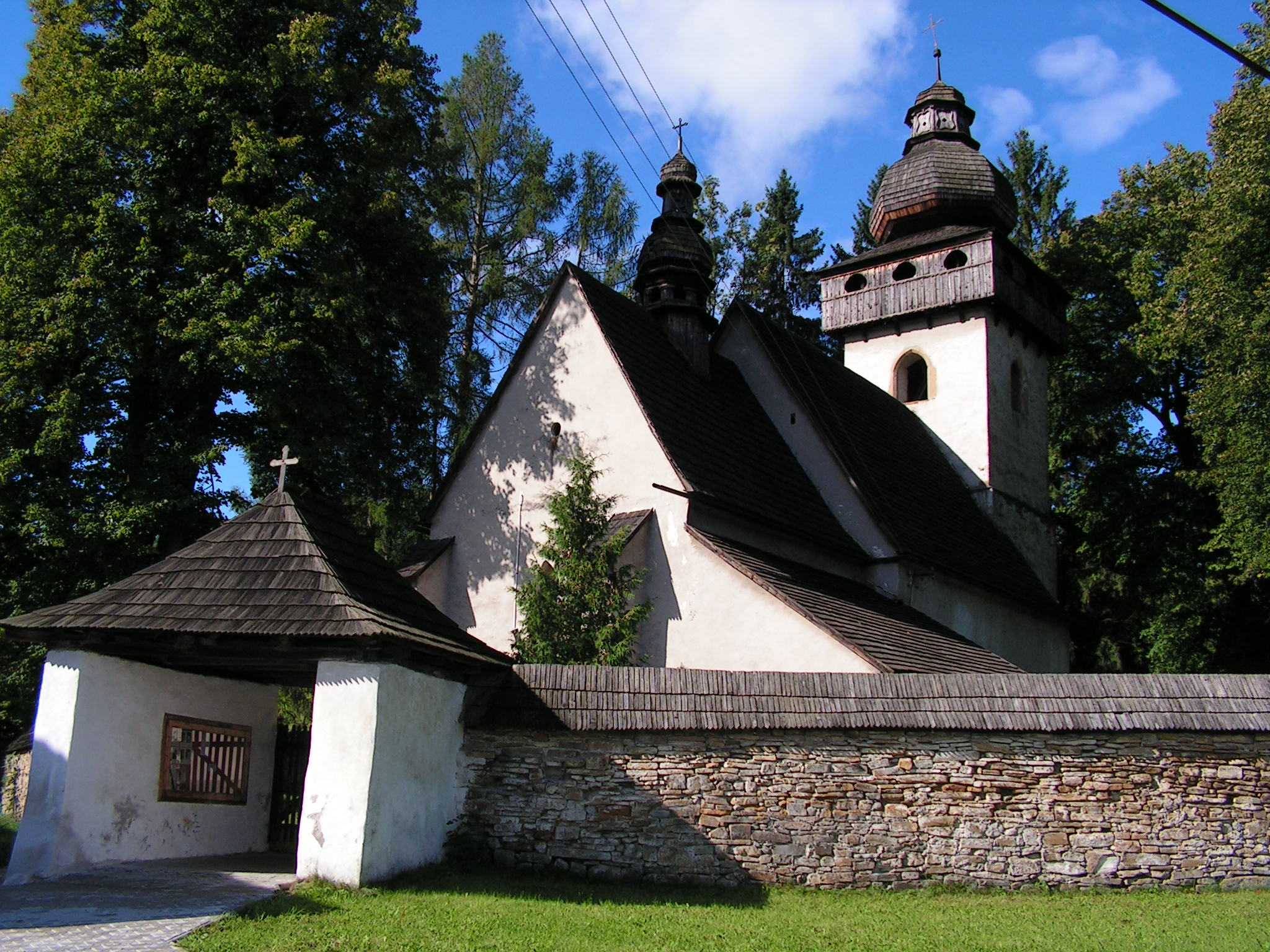 Vzácny gotický kostol v obci Smrečany